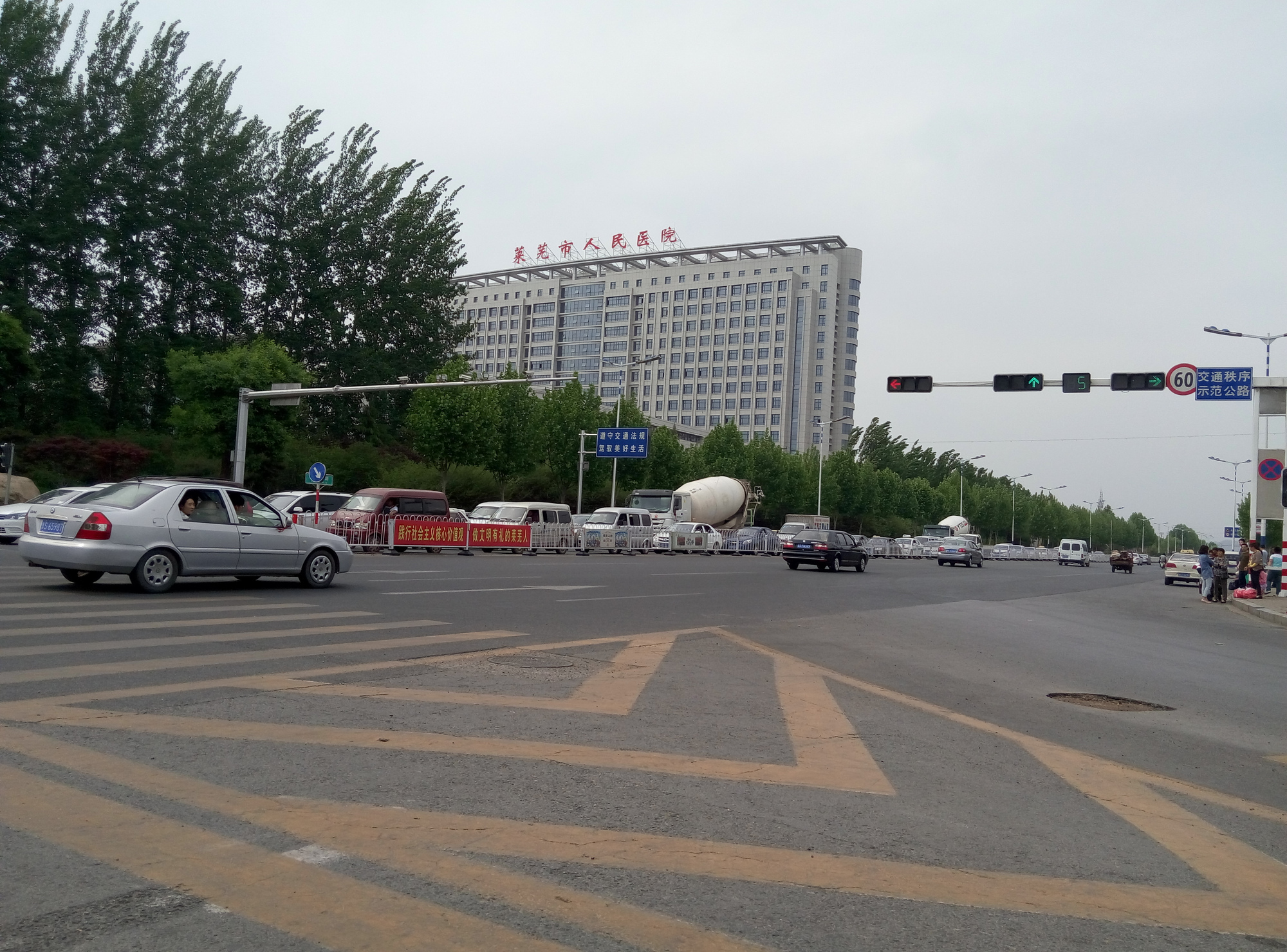 莱芜市街景，图中为莱芜市人民医院北楼。